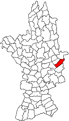 Categorie:Hărţi ale judeţului Olt